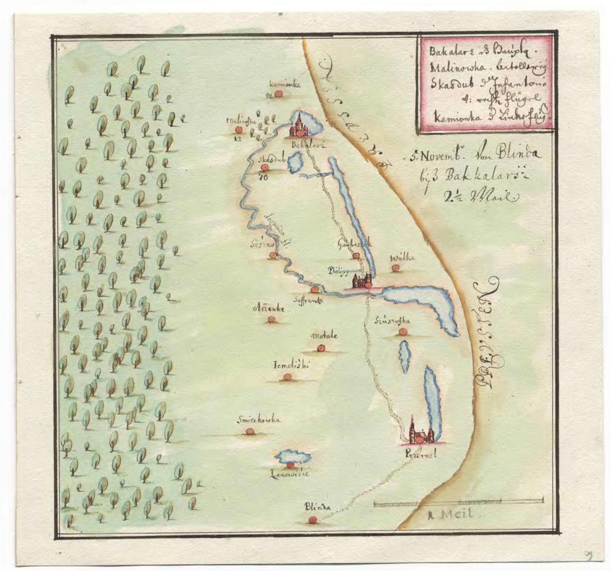 Беларуская (тарашкевіца): Бакаларава (Bakałarava), Філіпаў (Filipaŭ) і Пераросьля (Pierarośla). Мапа